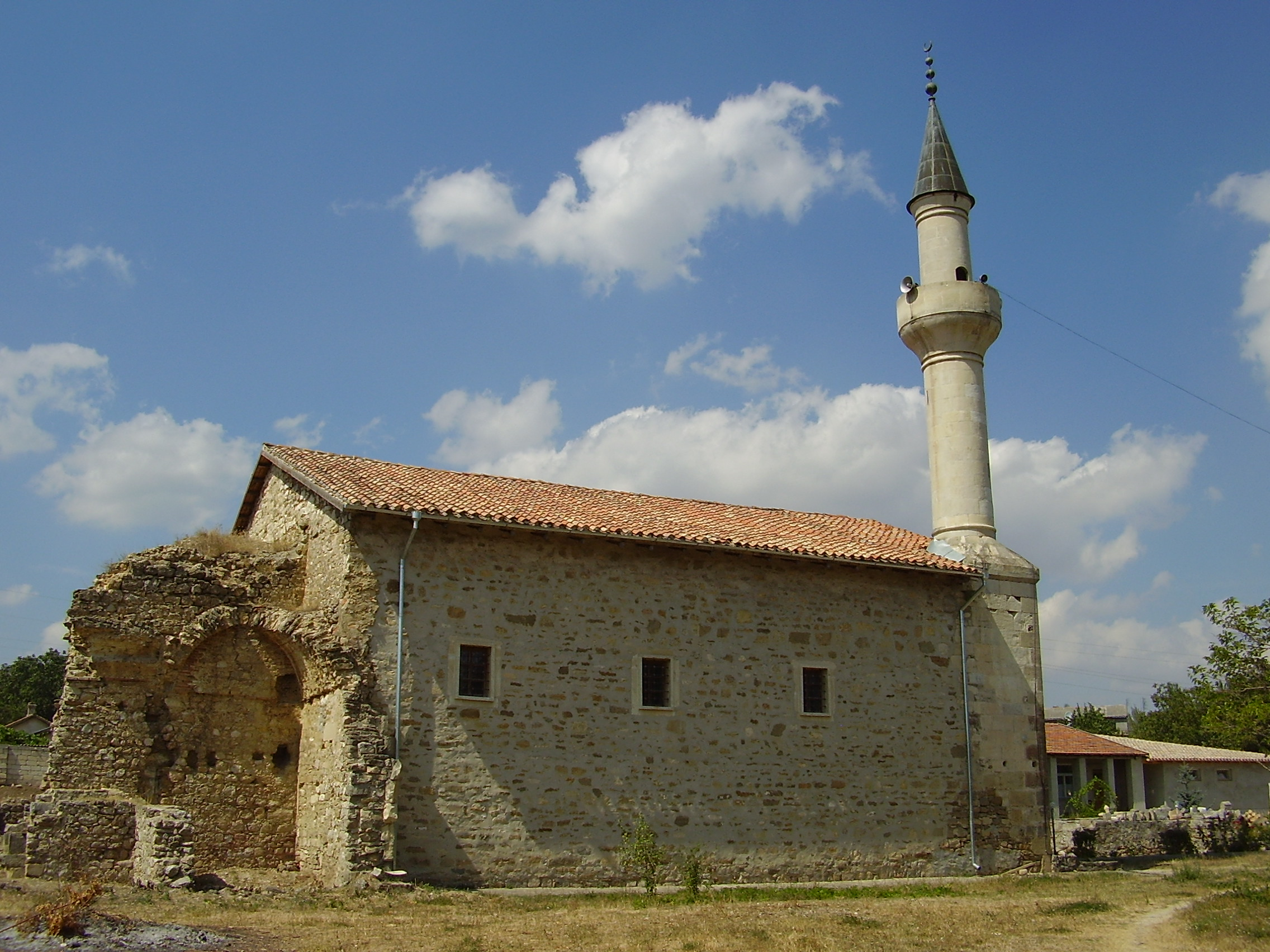 Мечеть Узбека і медресе, Старий Крим, вул. Чапаєва, 5